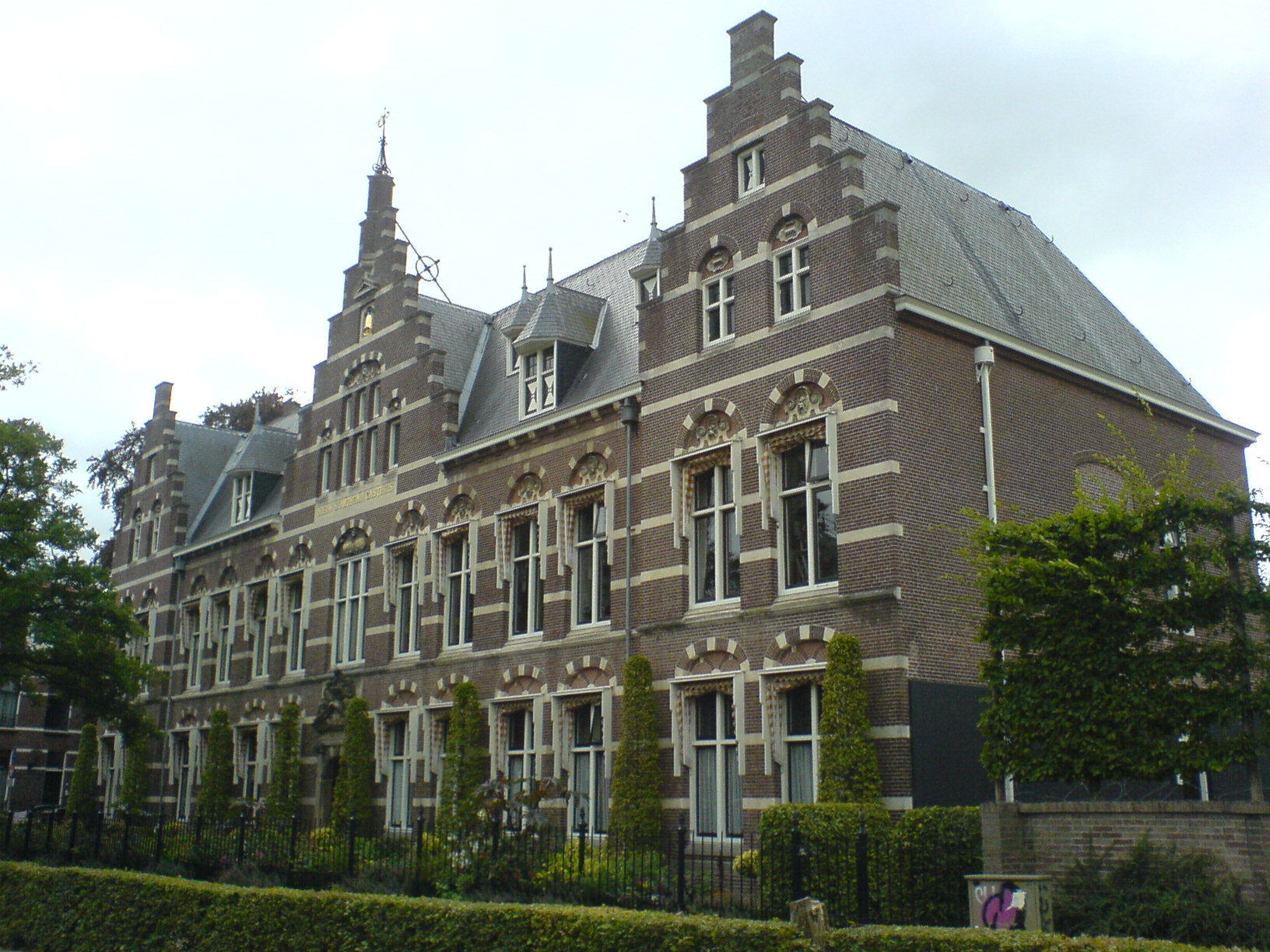 Ljouwert: Julianafleugel fan it Ny Sint-Anthony Gasthûs (arsjitekt: W.C. de Groot)